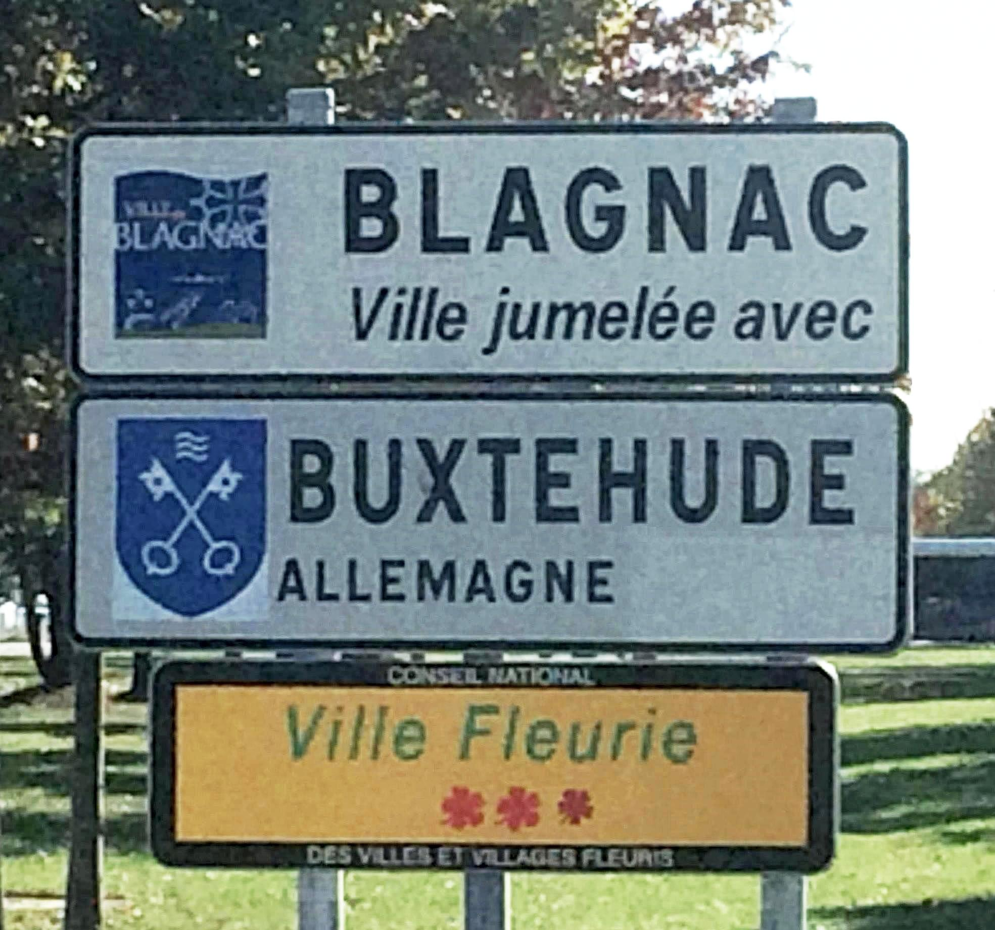 Blagnac - Buxtehude - Ville fleurie.